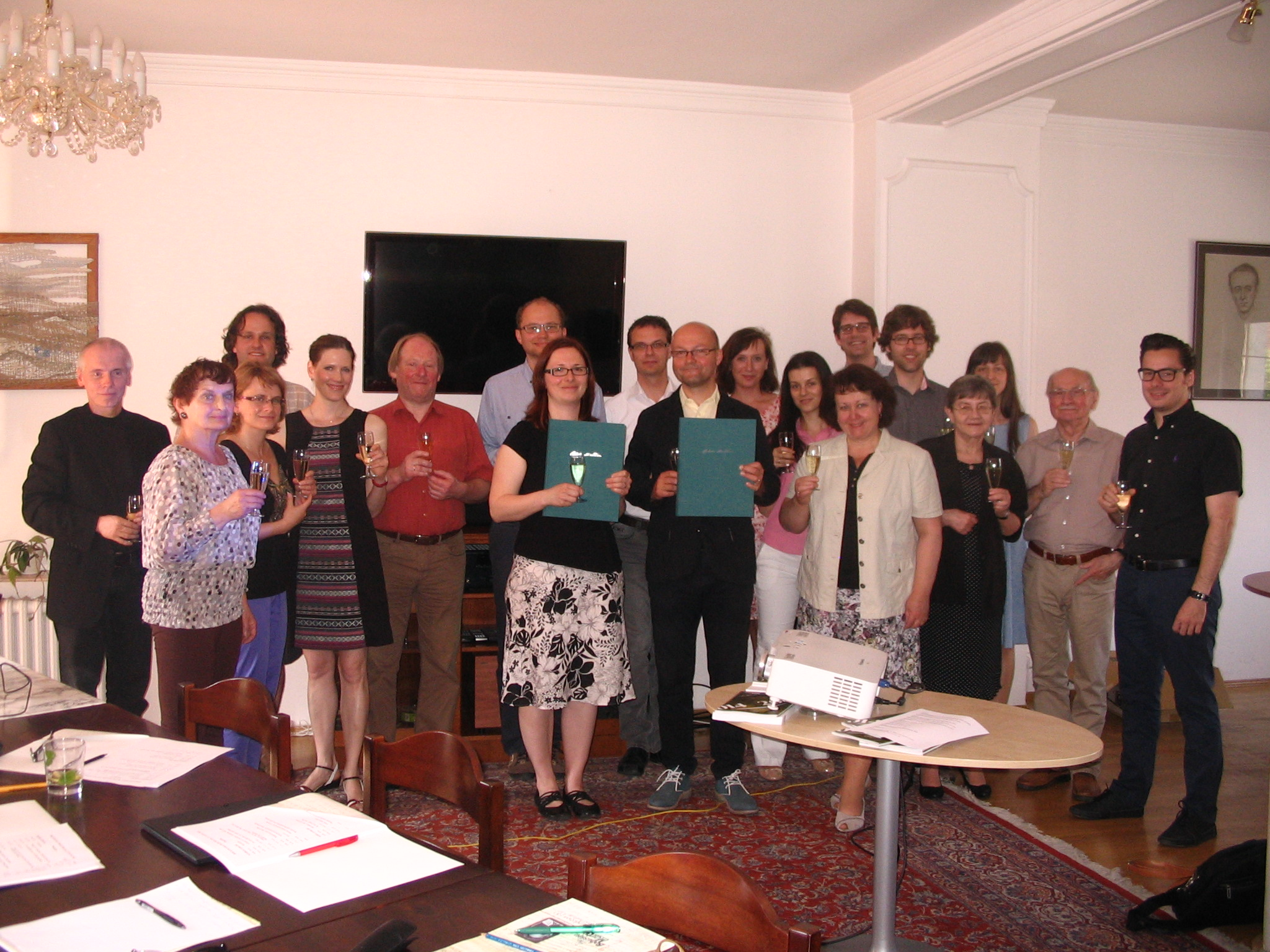 Slavnostní setkání ediční rady BMCE nad hotovým svazkem